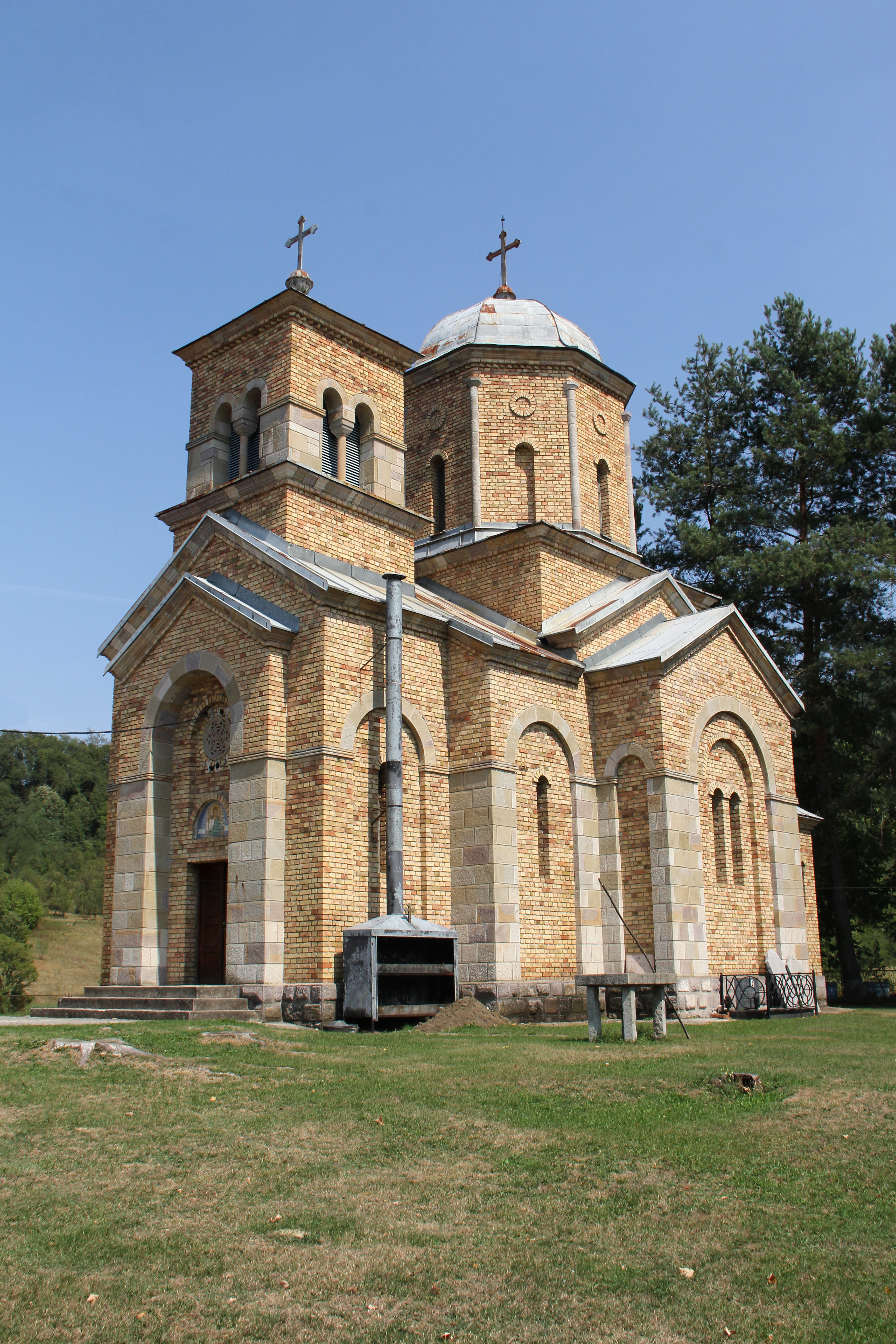 Zagrađe